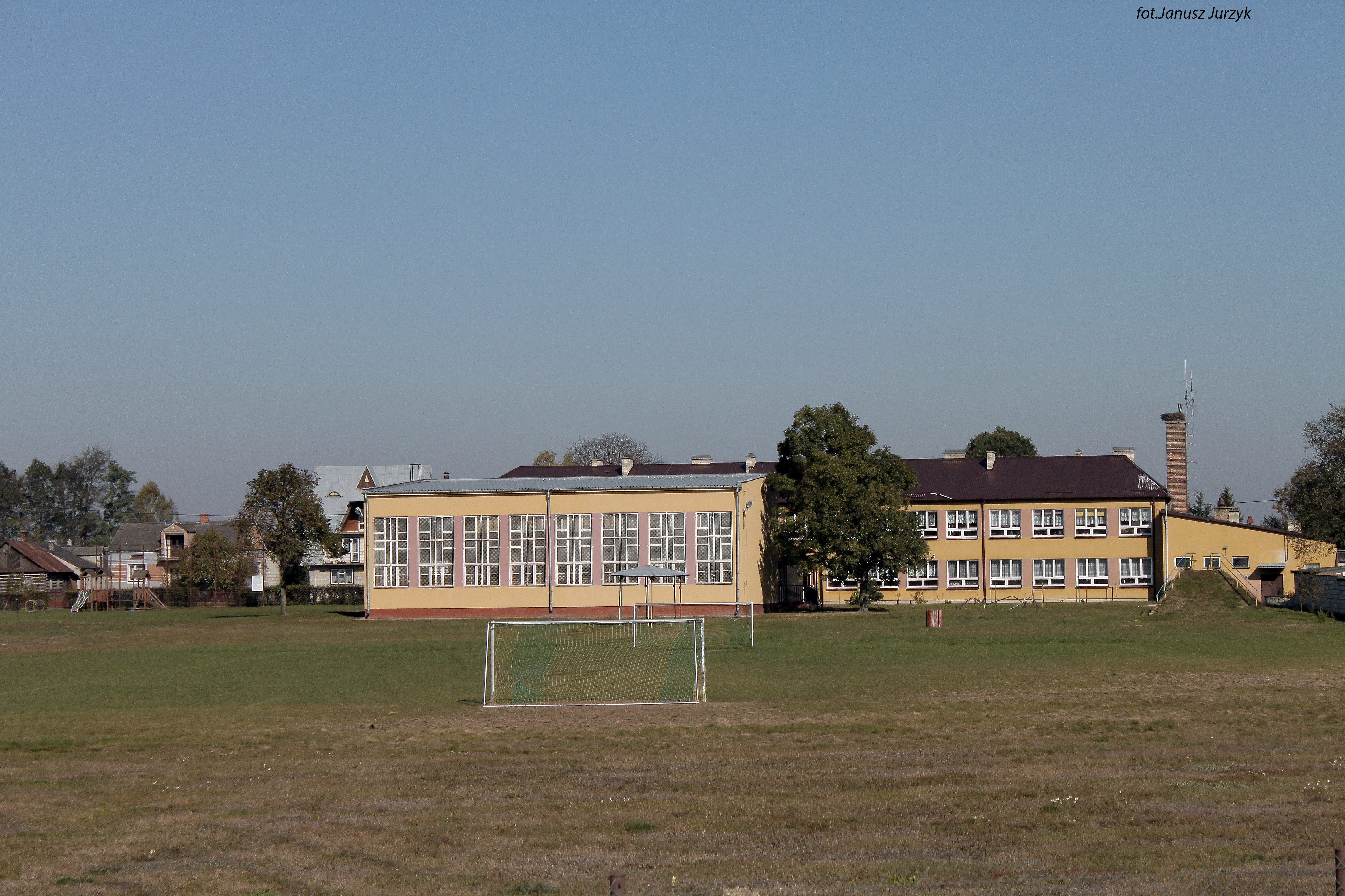 Szkoła Podstawowa im. M. Konopnickiej w Misiach.